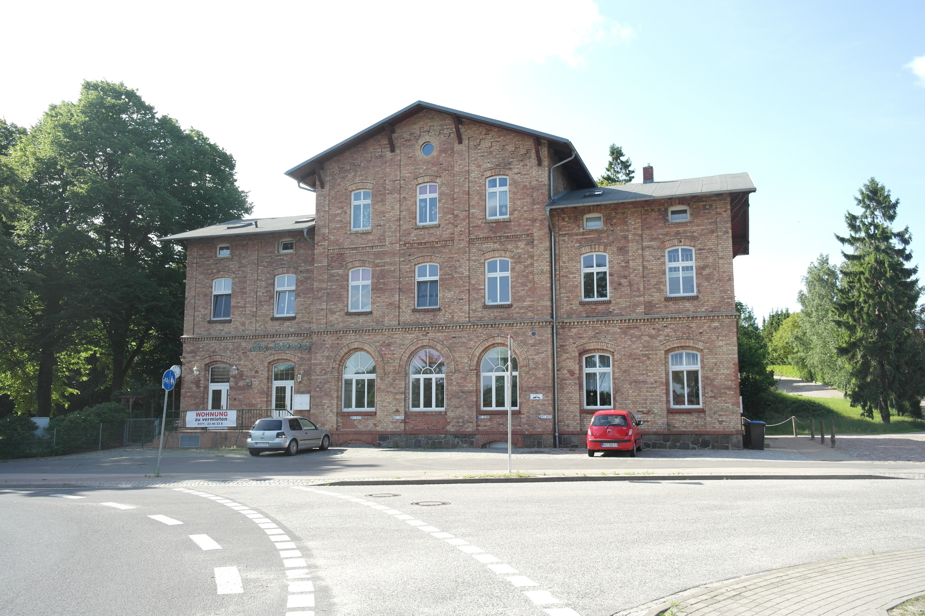 Bahnhof Woldegk, Straßenseite, Baudenkmal